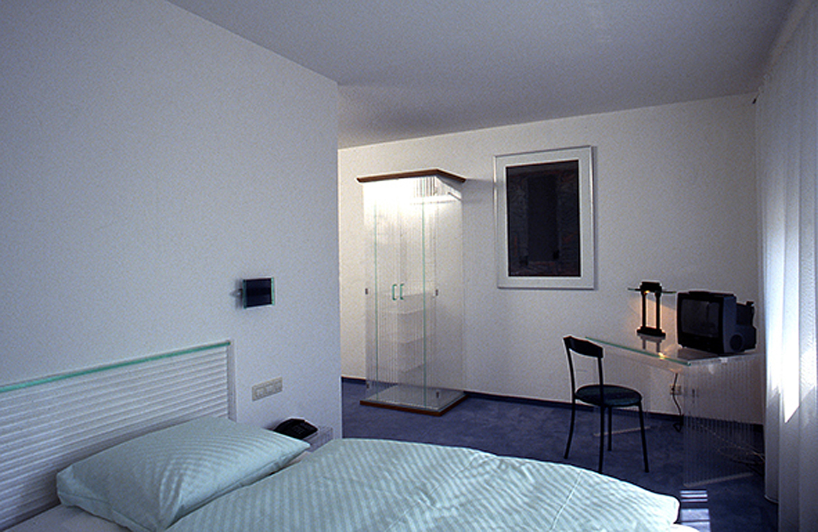 Von der Gruppe Unikate um Prof. Wolfgang Laubersheimer für das Hotel UNO1 in Großbettlingen gestaltete Acrylmöbel